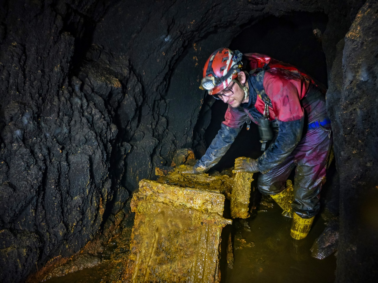 Förderwagen Apfelbaum